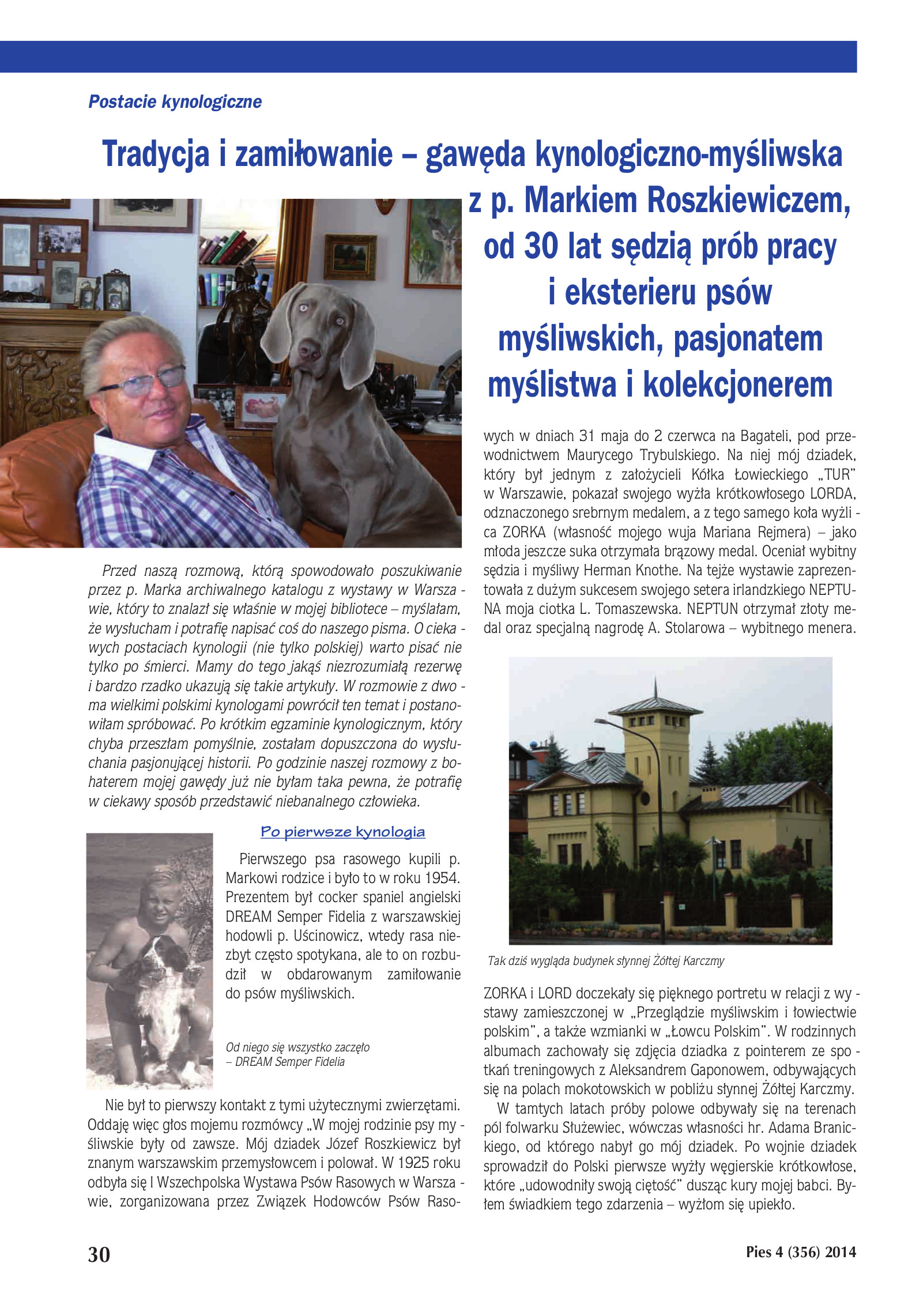 "Tradycja i zamiłowanie", PIES, 4 (356) 2014, strona 1/4.